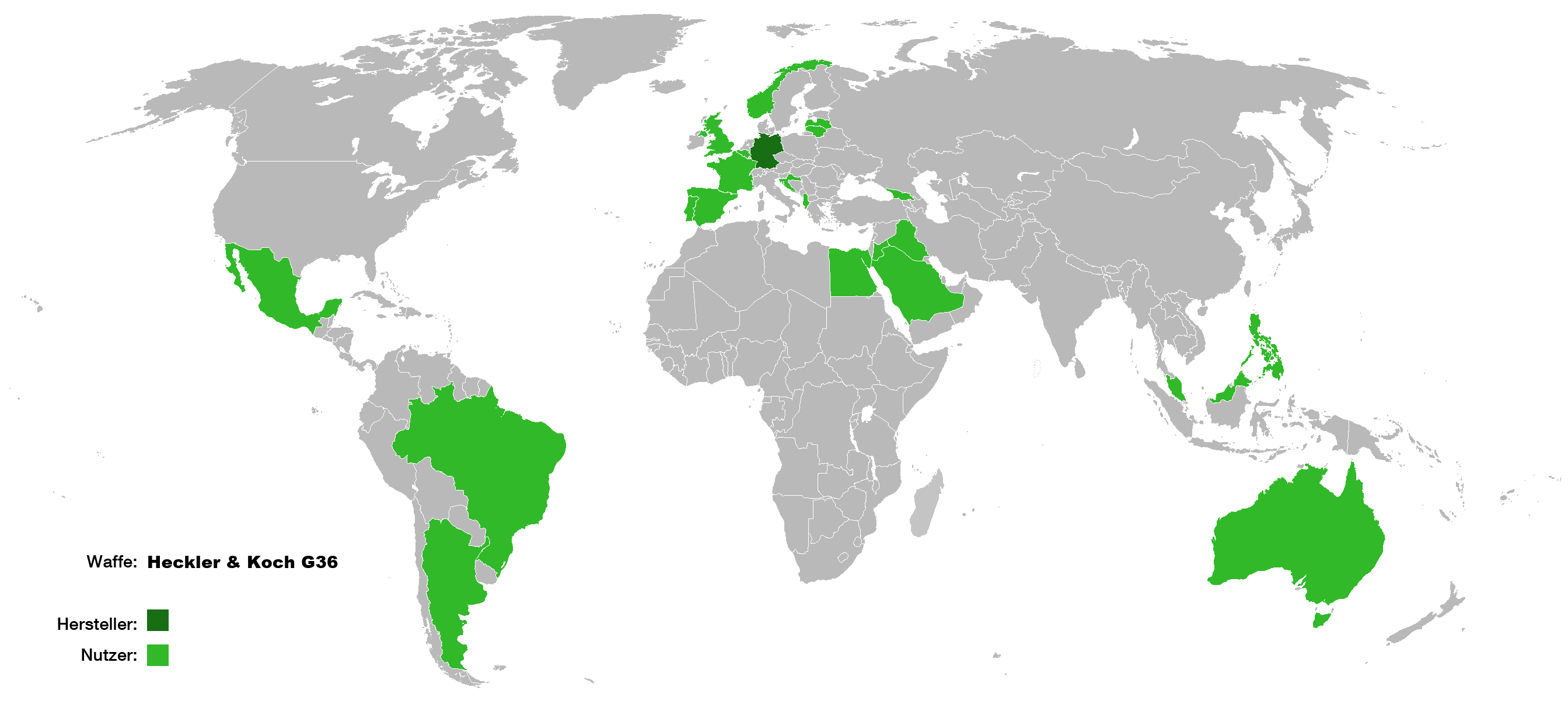 Verbreitung des Sturmgewehr HKG36